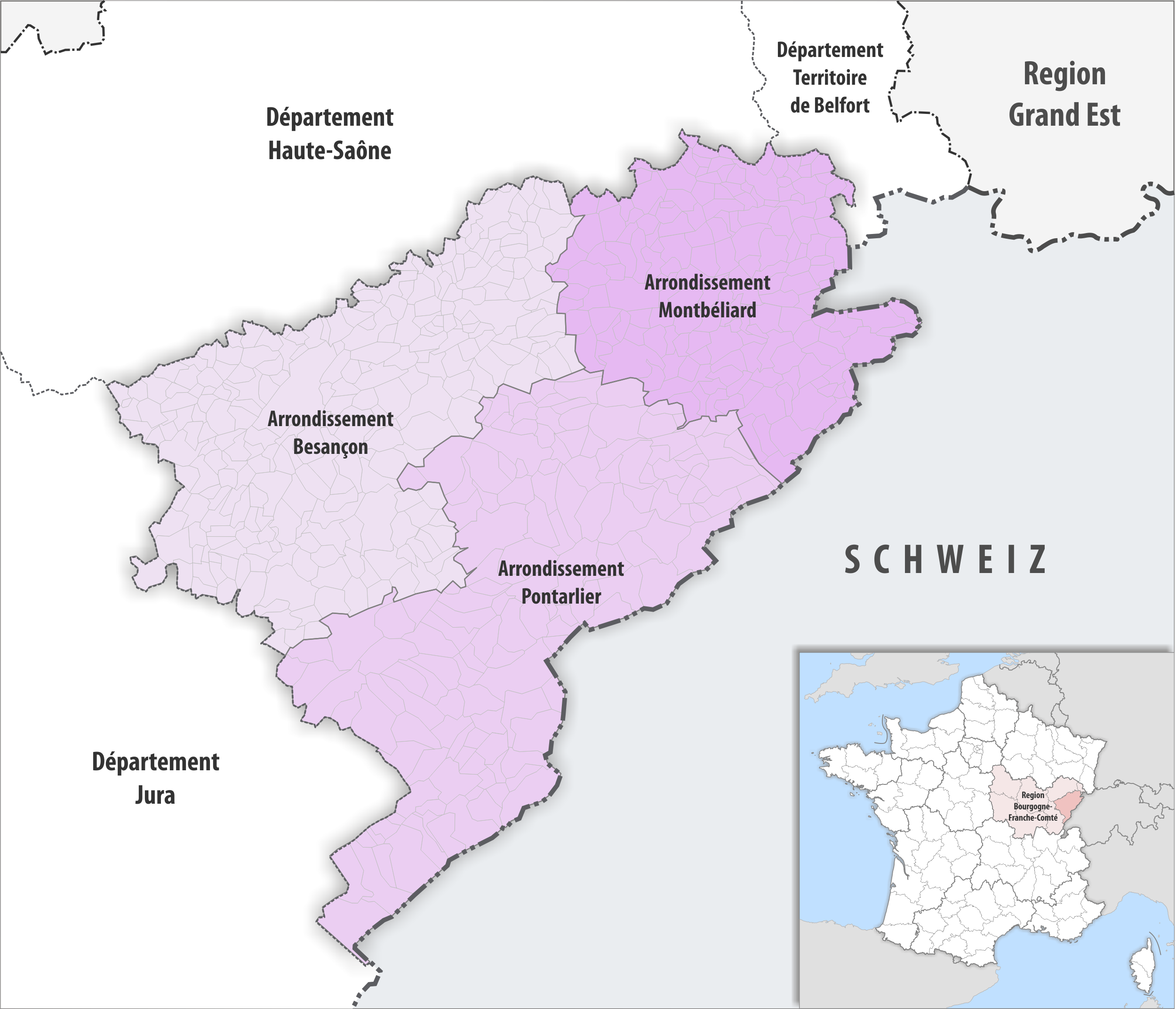 Gemeinden und Arrondissemente im Departement Doubs